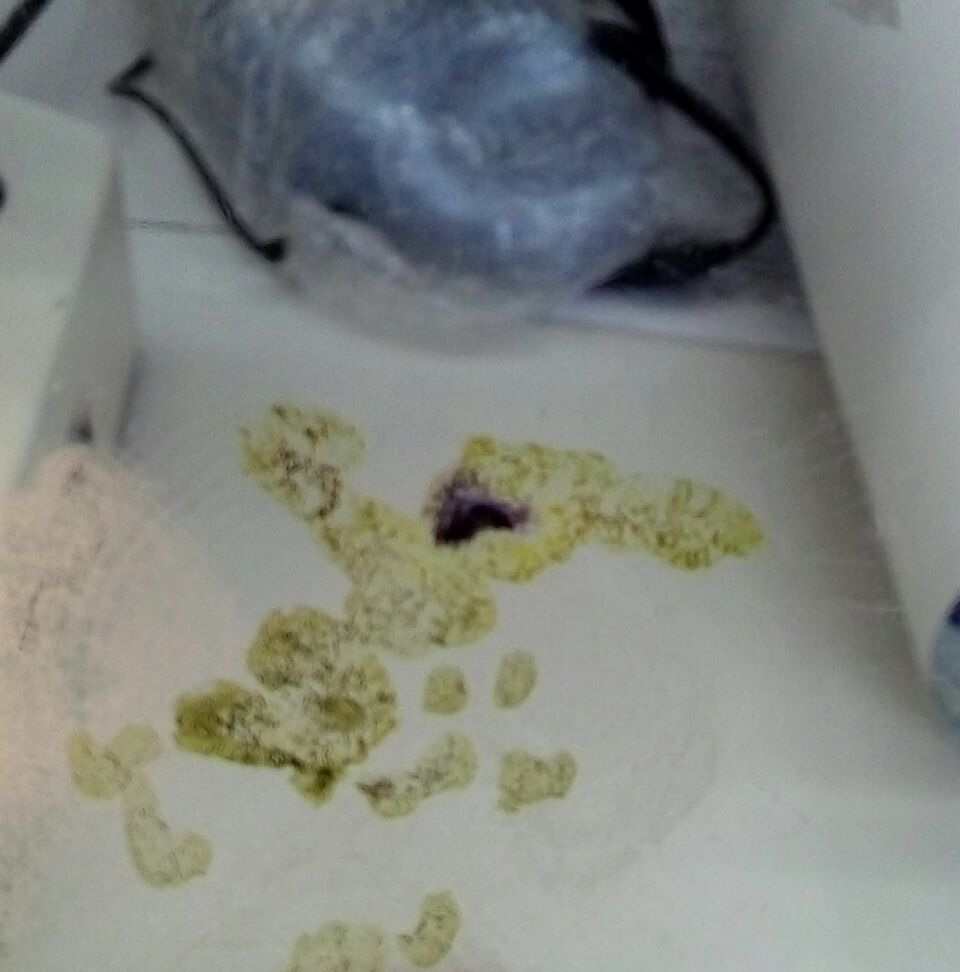 Cristales de salicilato de hierro (III) tras eliminación de solvente